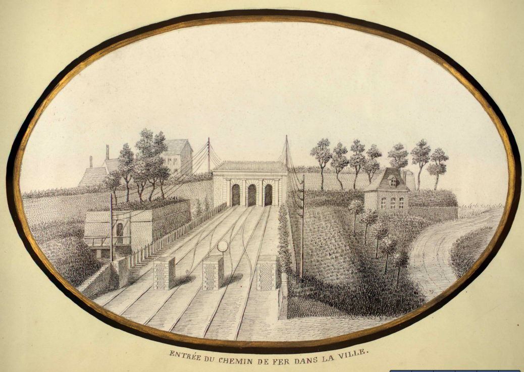 Le passage des fortifications pour l'accès à la gare intra muros. Vue d'artiste par Baron en 1860.